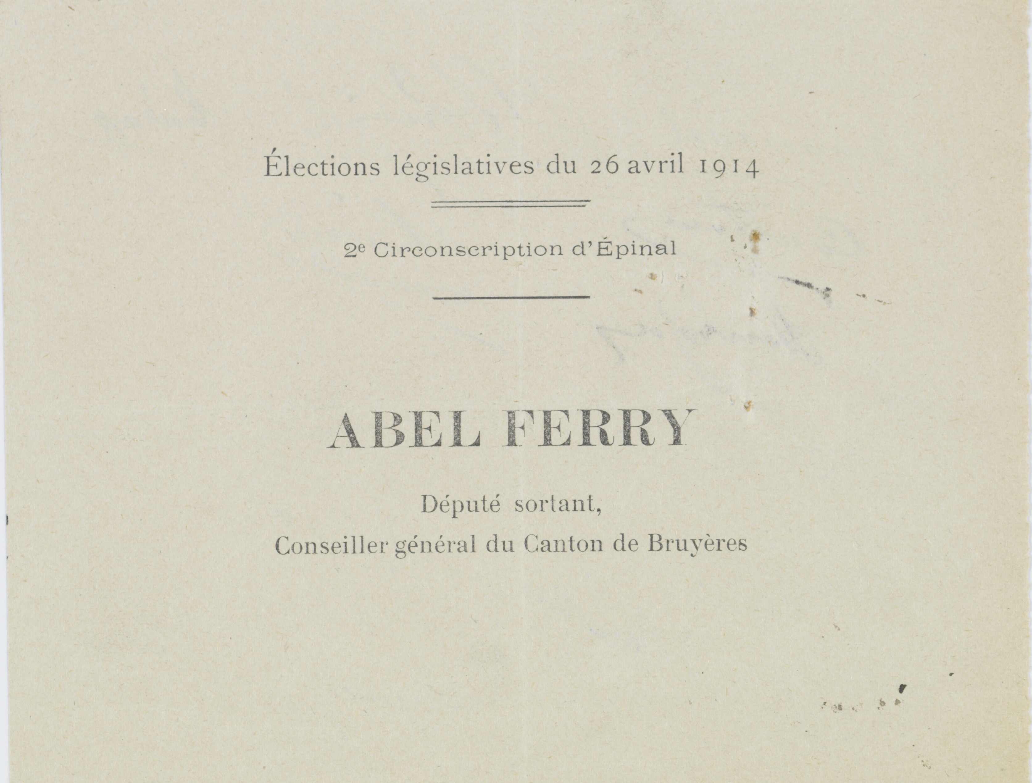 Bulletin de vote pour Abel Ferry, candidat aux élections législatives dans la deuxième circonscription d'Épinal (Vosges)